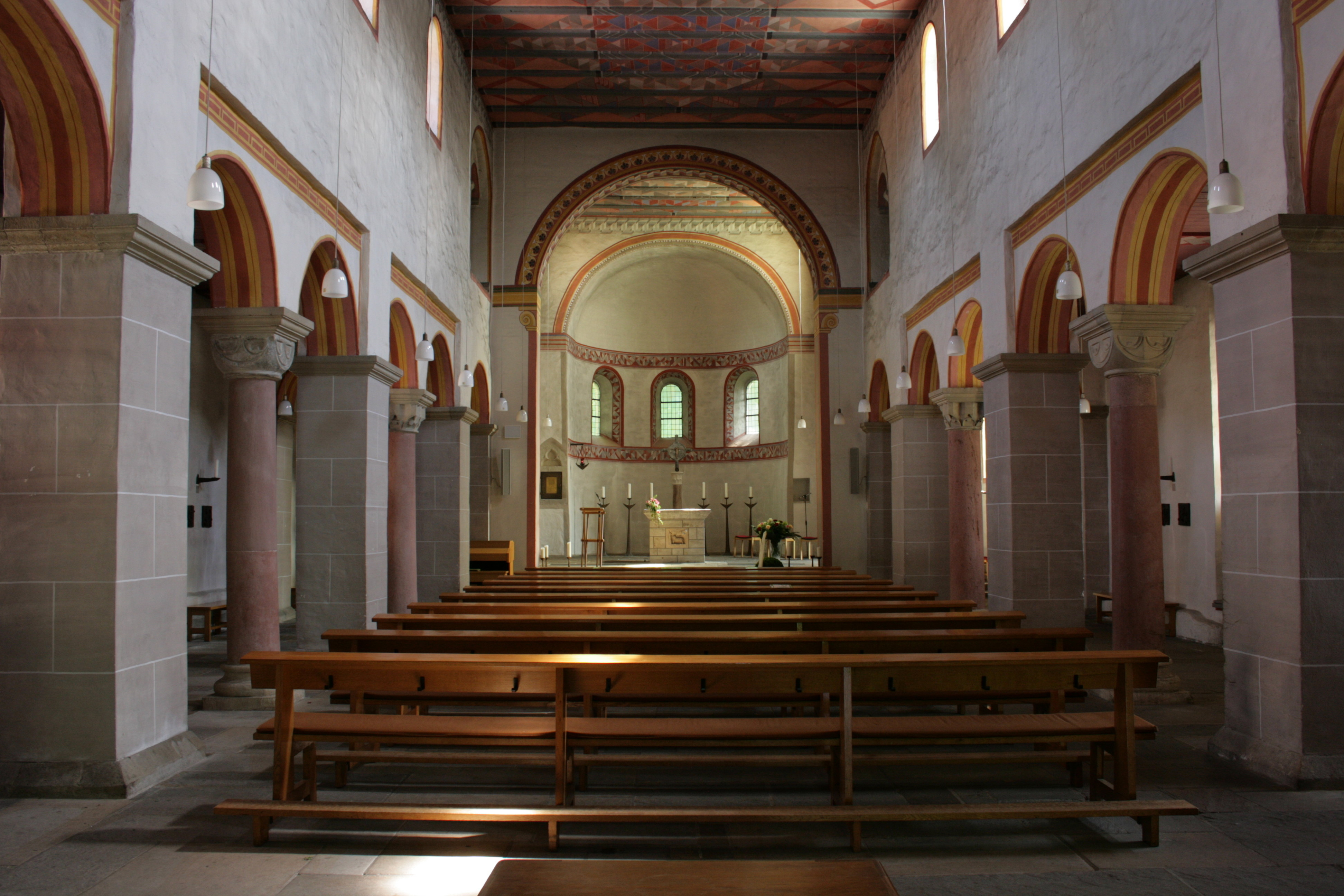 Sankt Lucius in Essen-Werden